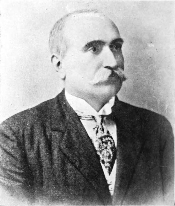 Dorabji Tata